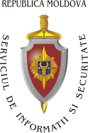 Sigla Serviciului de Informații și Securitate